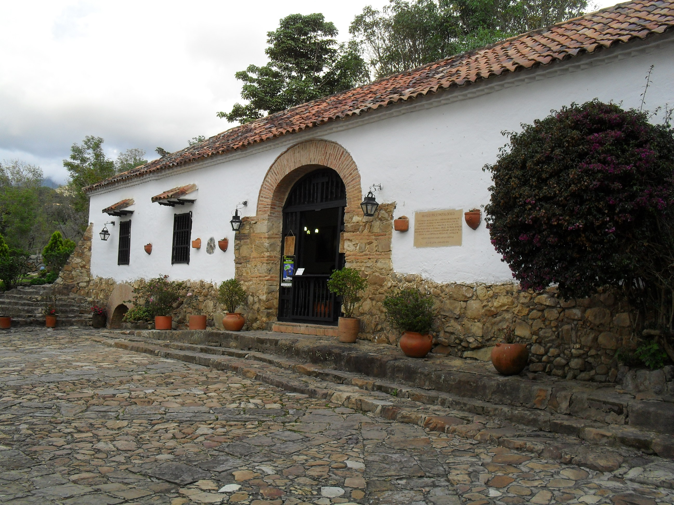 Fachada del Museo Paleontológico de Villa de Leyva, Boyacá, Colombia.